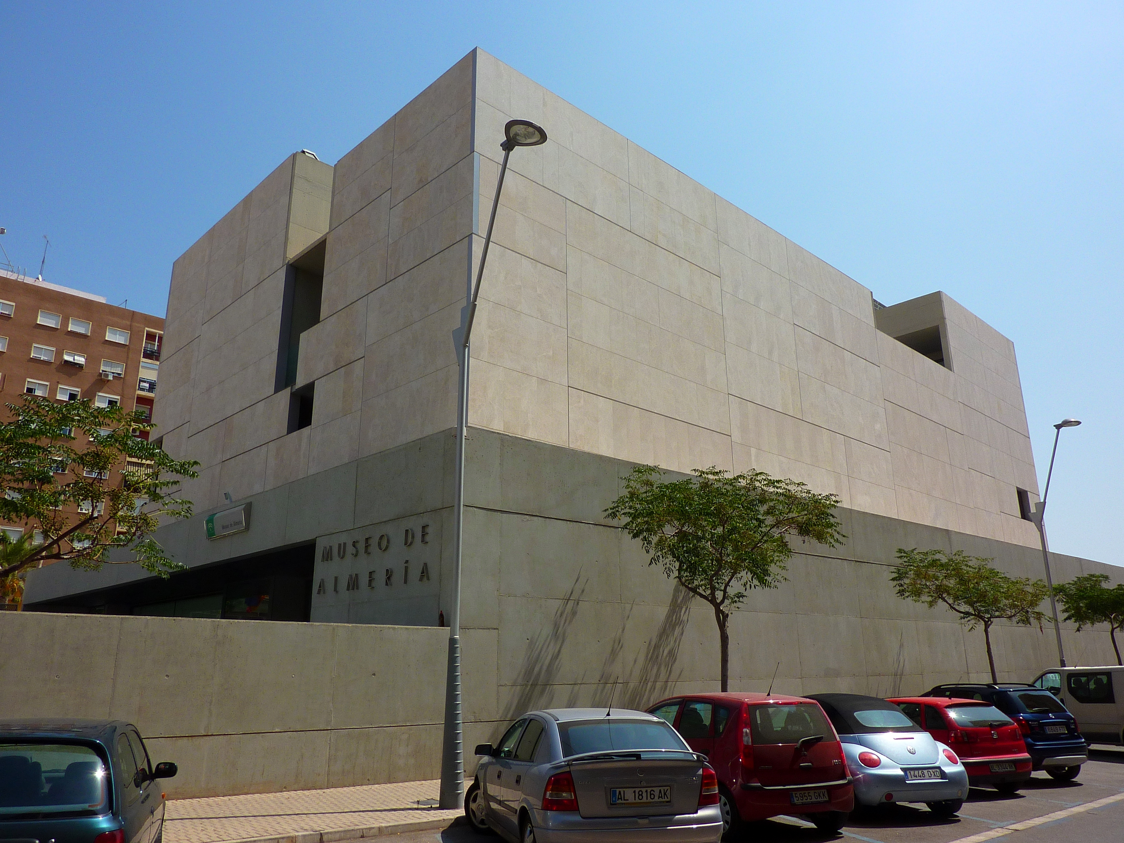 Museo de Almería.